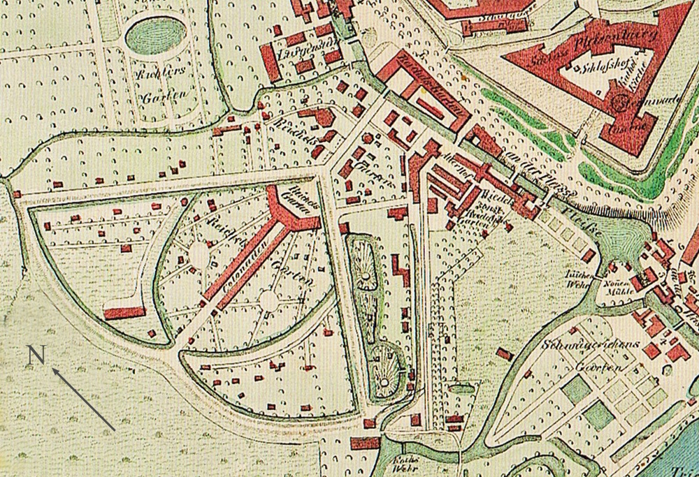 Reichels Garten auf einem Stadtplanausschnitt von Leipzig 1840